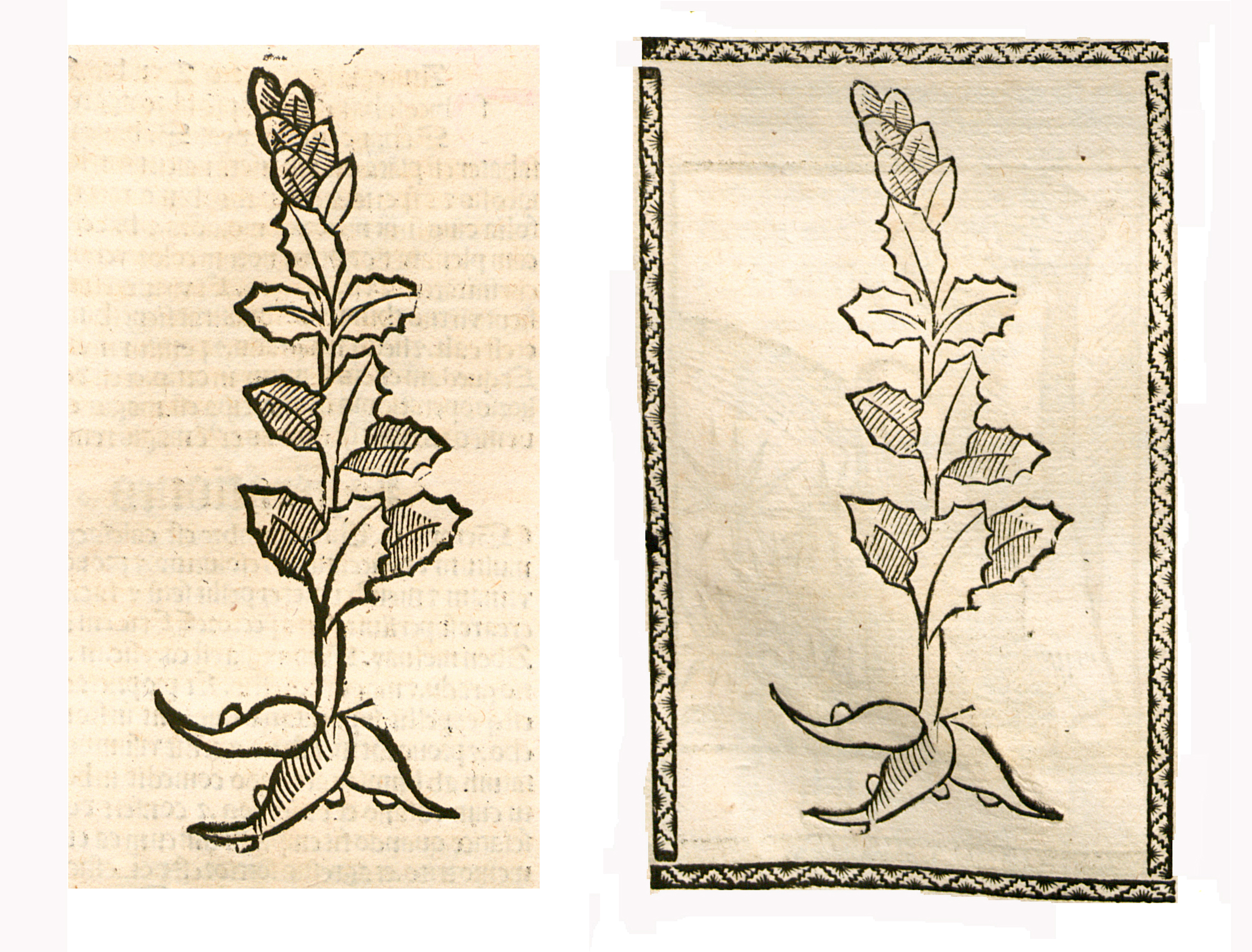 Abbildung vonː Stendel Wurtz (Orchis spec.)